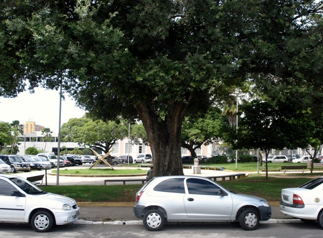 Praça André de Albuquerque em Natal, Rio Grande do Norte, Brasil.